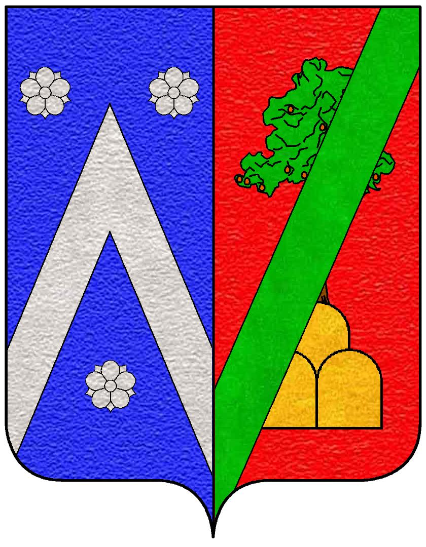 Stemma della famiglia Falcinelli Antoniacci